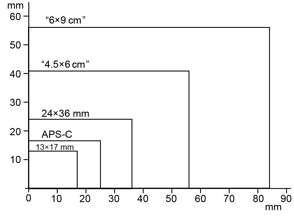 Сравнение форматов негативов